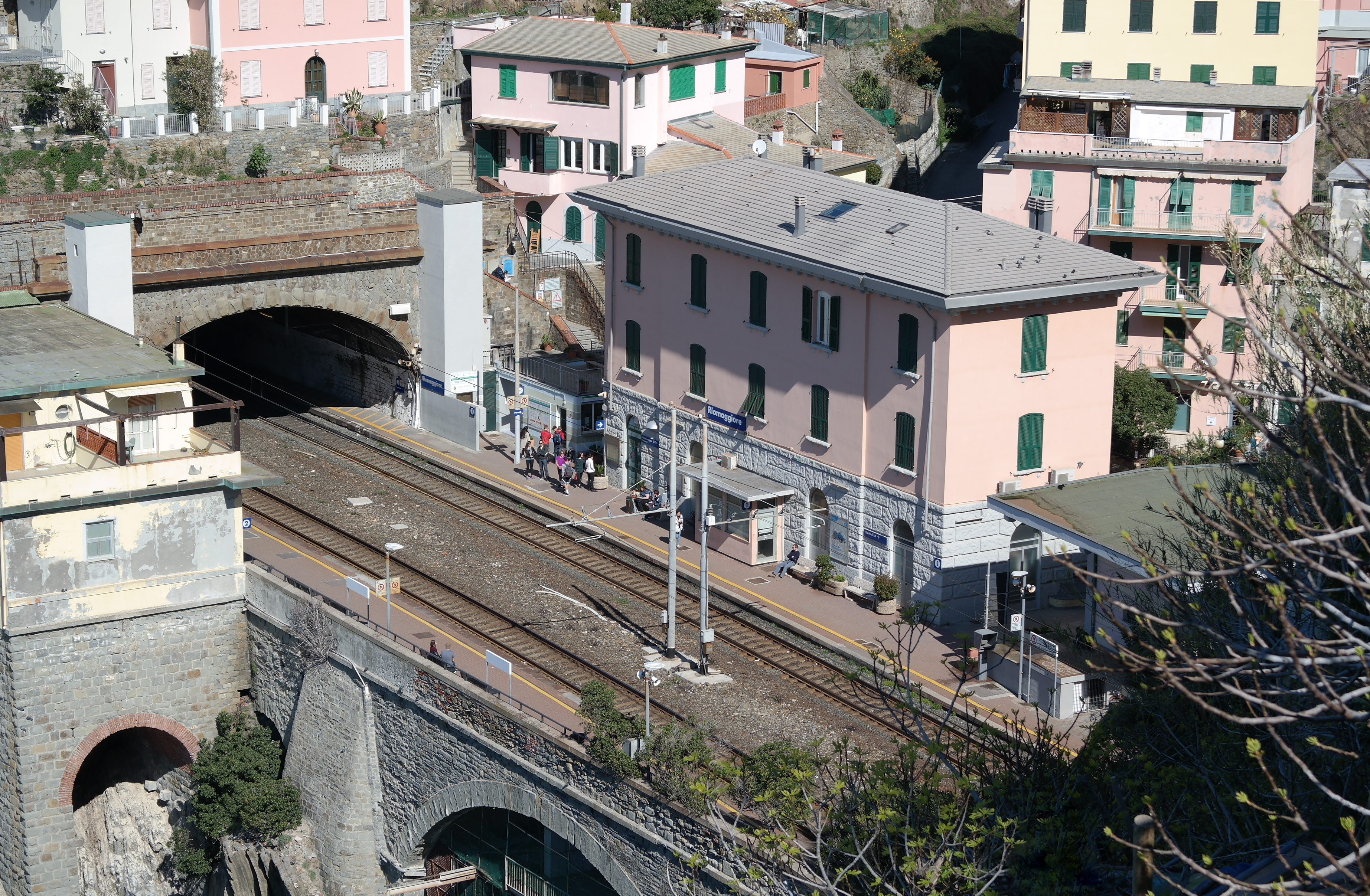 Stazione ferroviaria di Riomaggiore